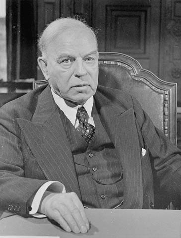 Rt. Hon. W.L. Mackenzie King